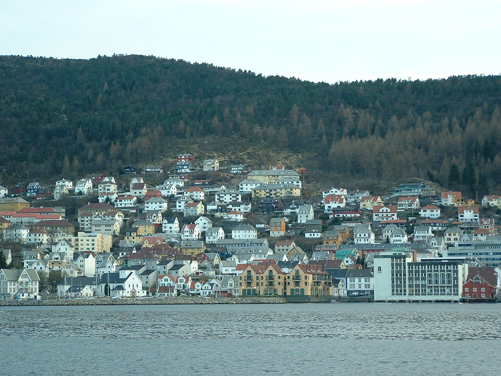 Strandstedet Laksevåg sett fra sjøen.